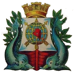 Brasão da cidade do Rio de Janeiro em 1896.